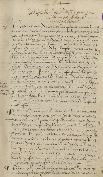 Encabezamiento de la declaración jurada de Diego Huallpa ante el presbítero Rodrigo de la Fuente. 31-XII-1572